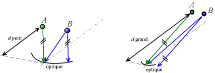 Sélection angulaire en fonction de la distance. De loin (figure de droite), la direction des rayons est aussi la direction de l'objet ; les rayons provenant d'un même objet sont quasi parallèles. Ce n'est pas le cas si les objets sont près (figure de gauche) ; deux rayons parallèles peuvent provenir de deux objets non alignés.